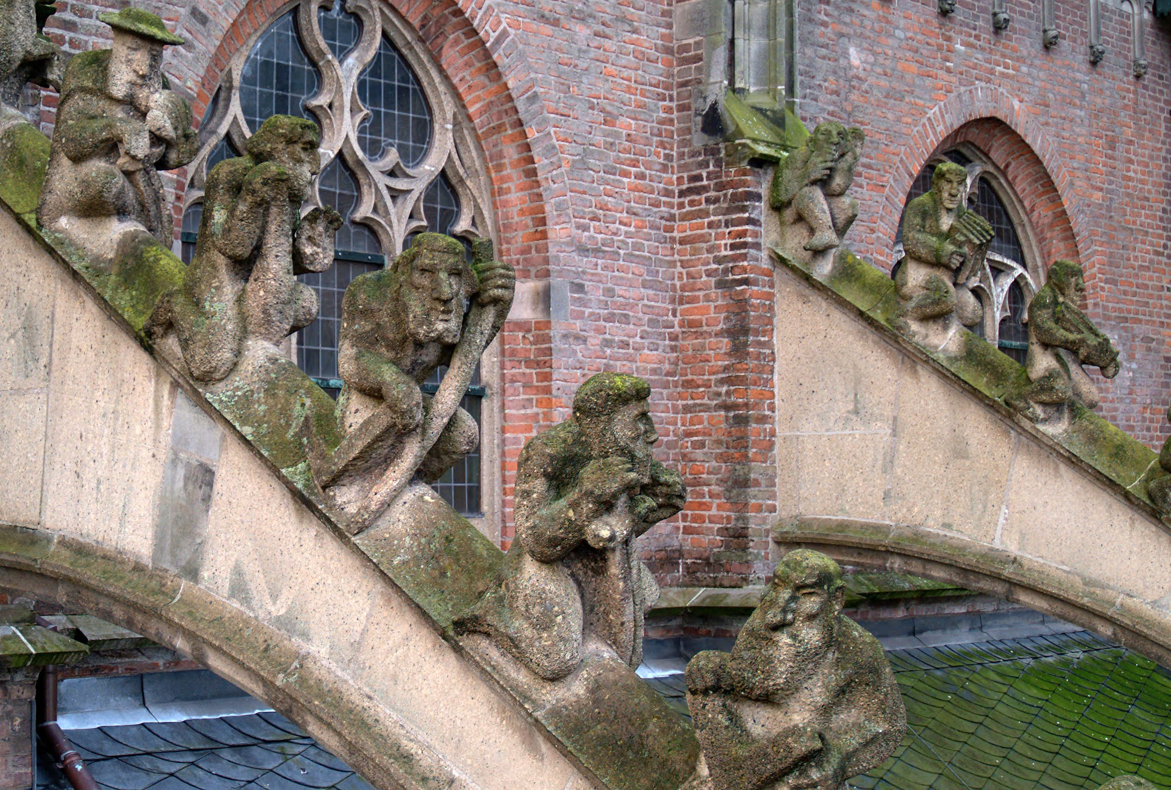 Arnhem - luchtboogbeelden aan de Eusebiuskerk van Eduard van Kuilenburg